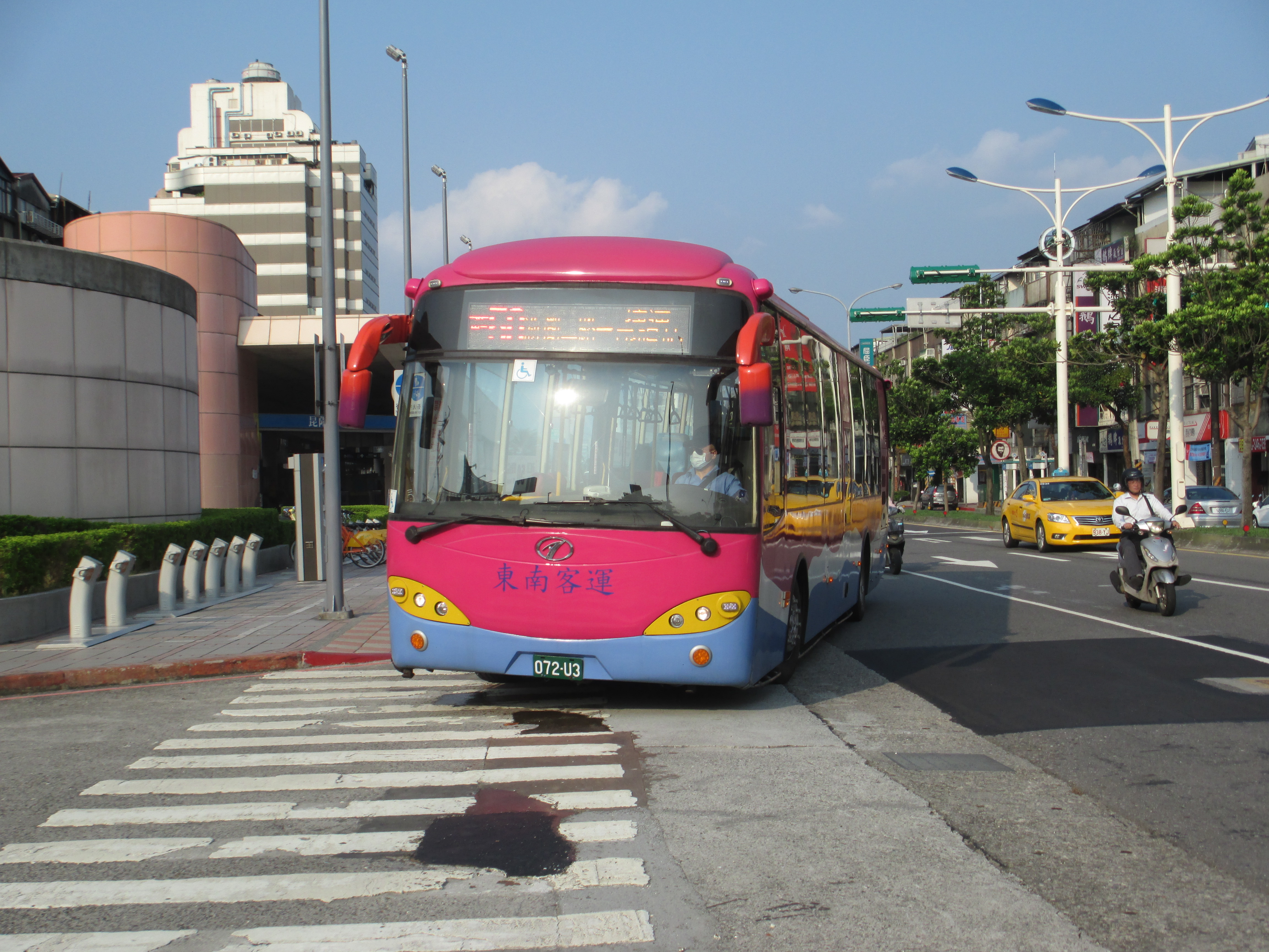 東南客運2013年安源客車ZKPJLB6129I低地板大客車072-U3。